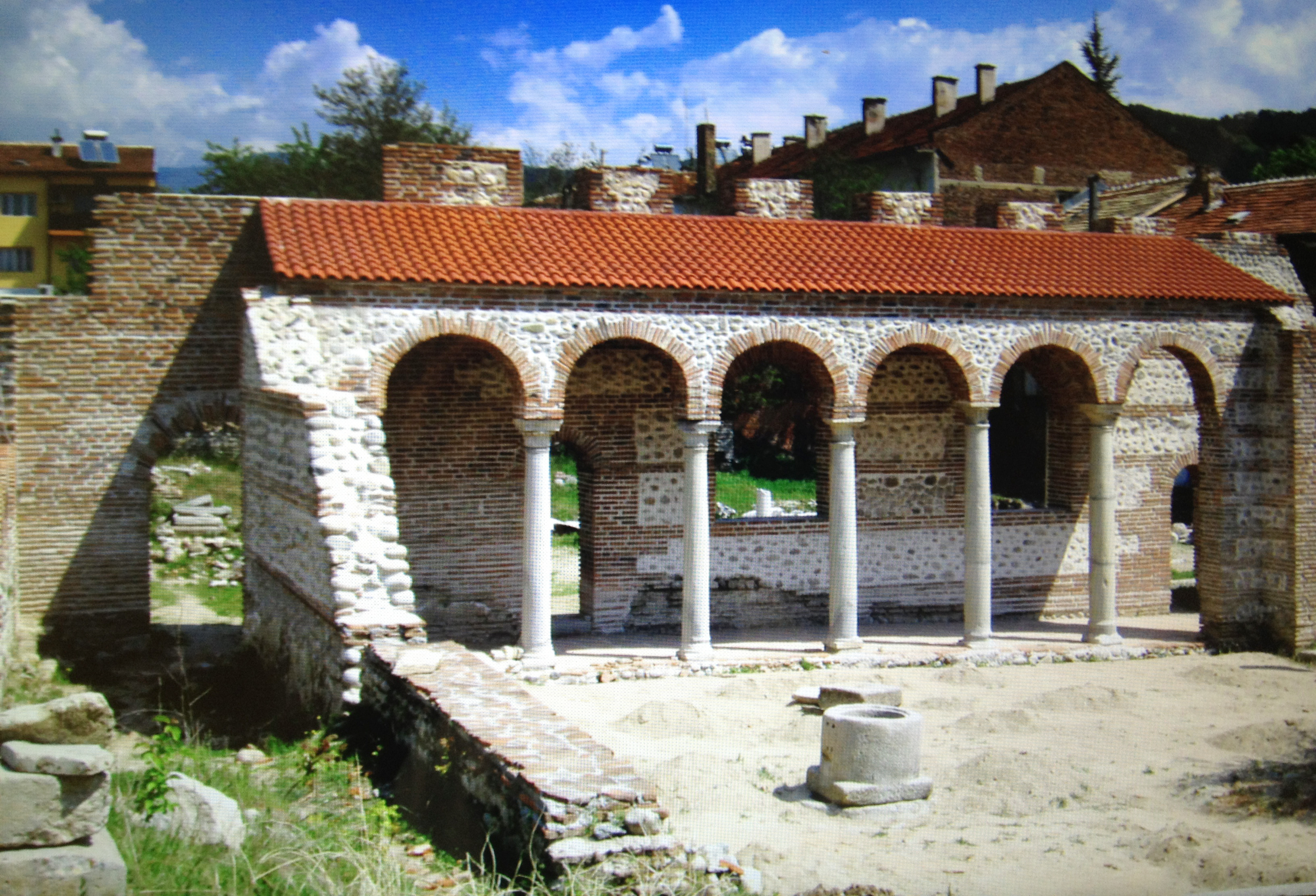 Епископски комплекс с базилика гр. Сандански